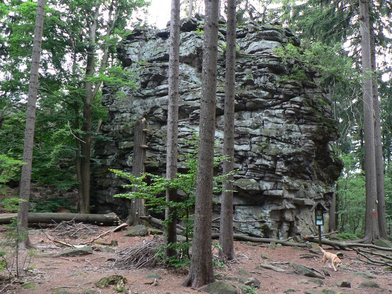 Žďárské vrchy.